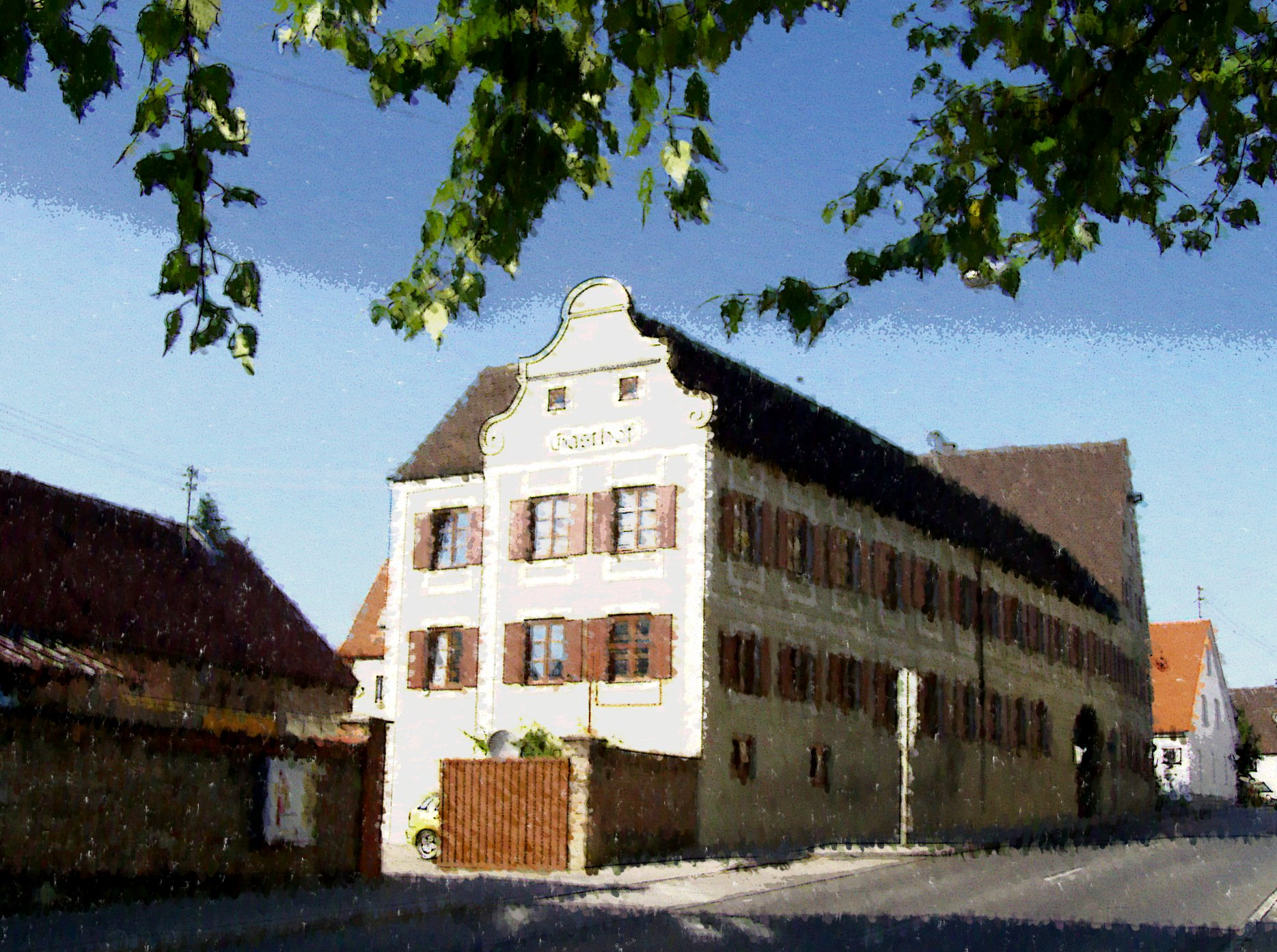 Gasthof Adler in Großaitingen